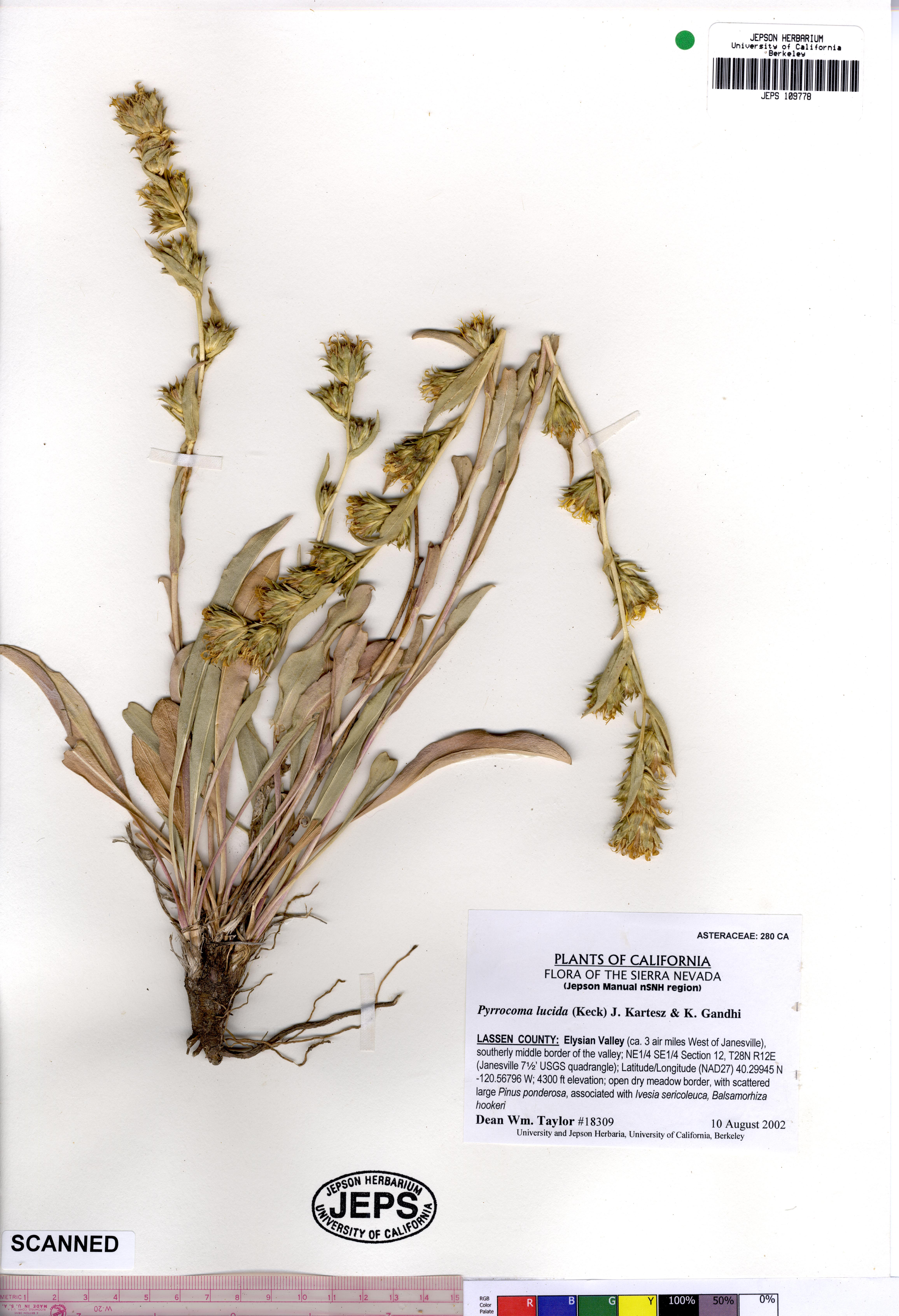 Pyrrocoma lucida JEPS109778